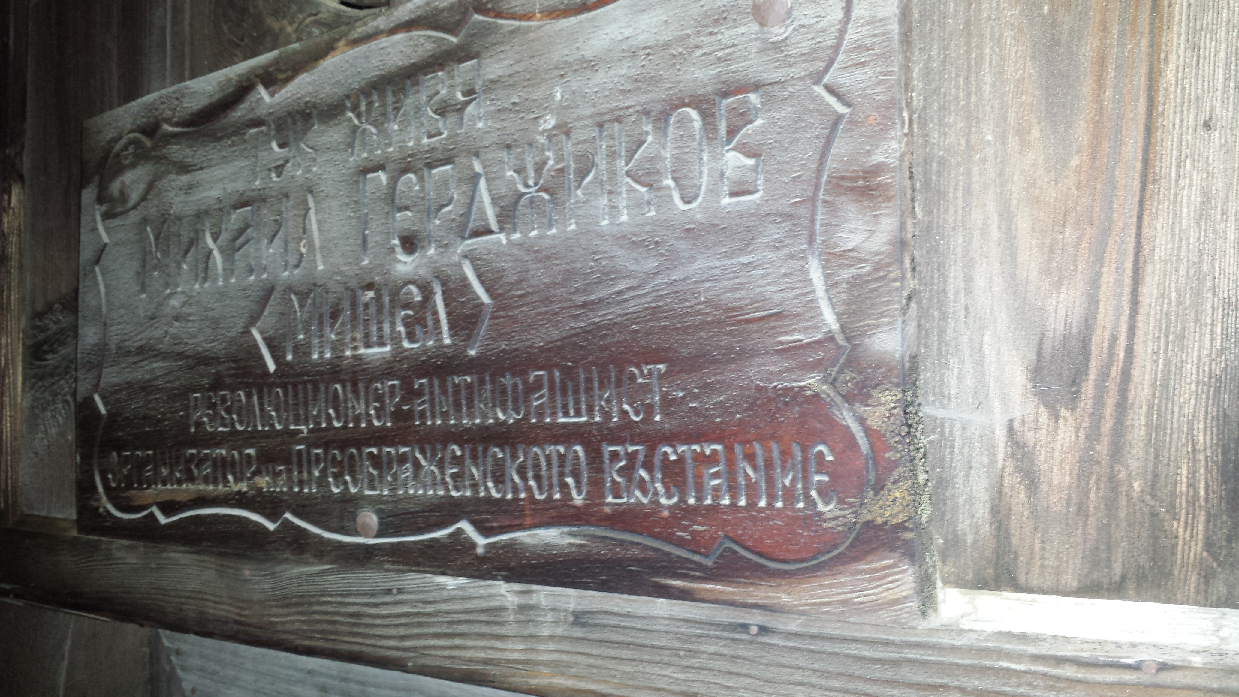 Мишел